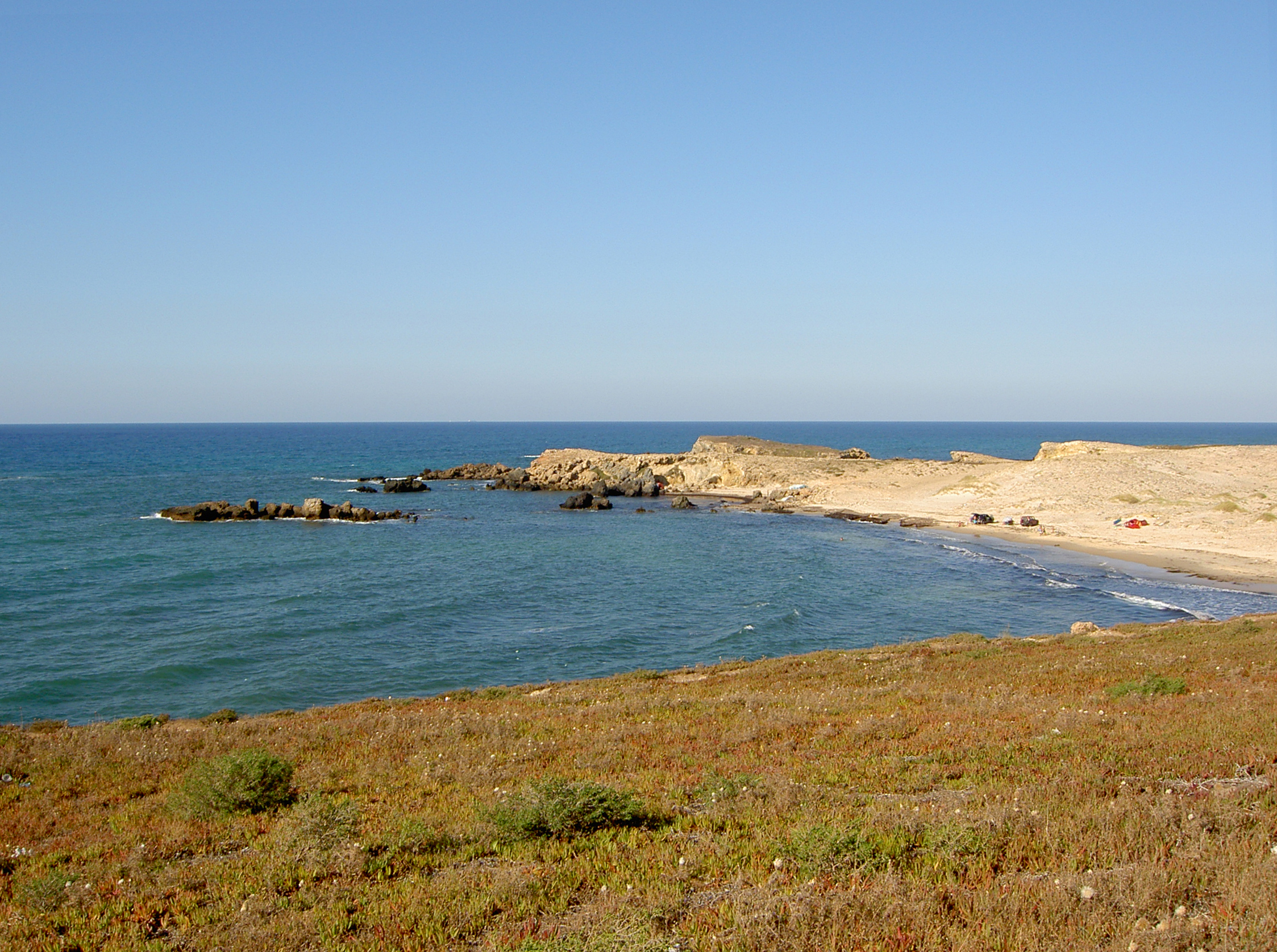 Cap Angela, Bizerte, Tunisie